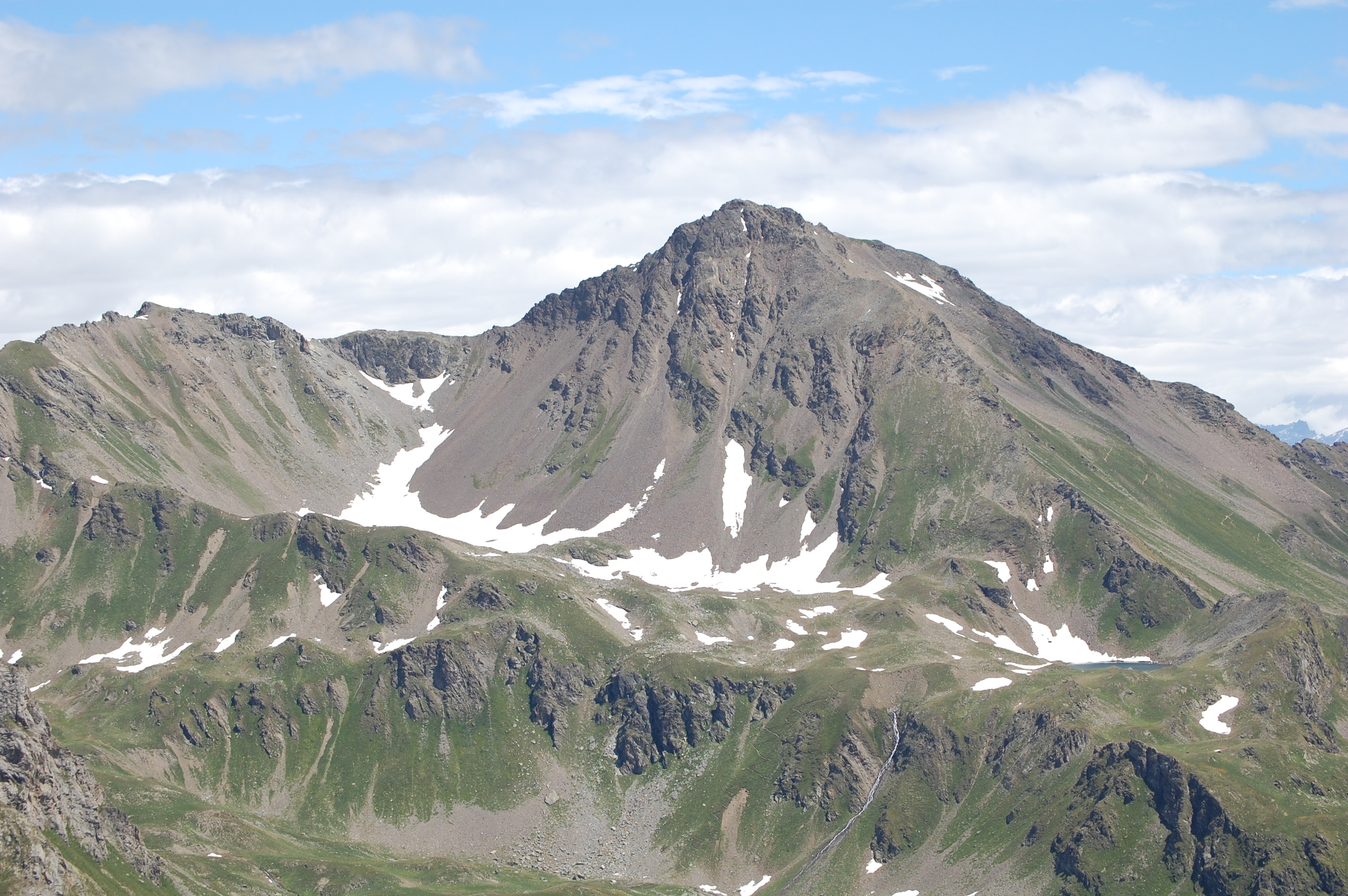 Mont Fallère - Versant ouest (vu depuis la Point Leysser)